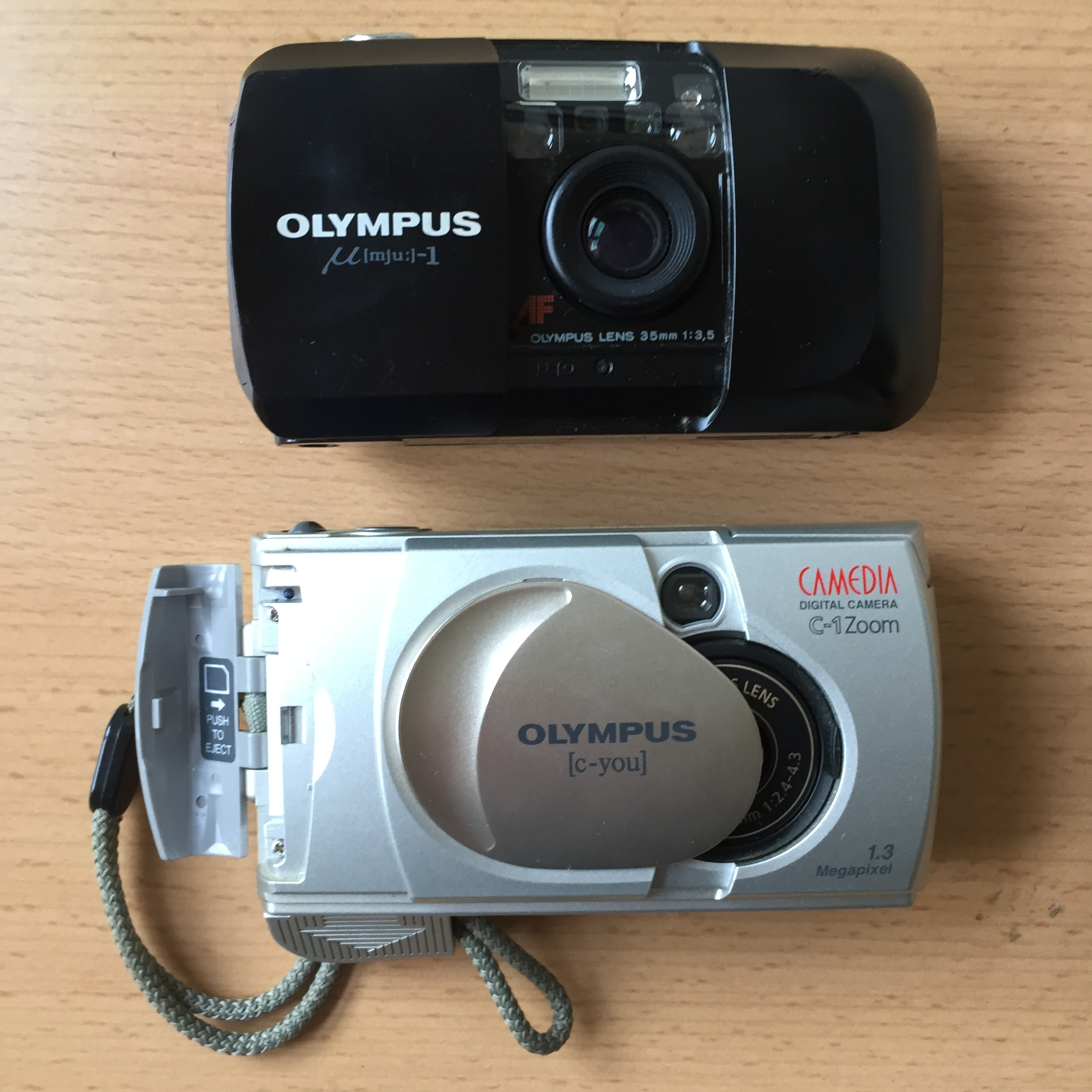 Olympus mju 1 und CAMEDIA C1